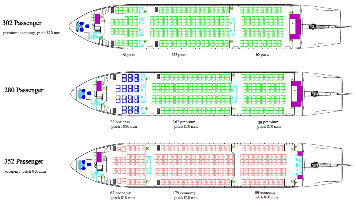 Компоновки салона самолета "Фрегат Экоджет"